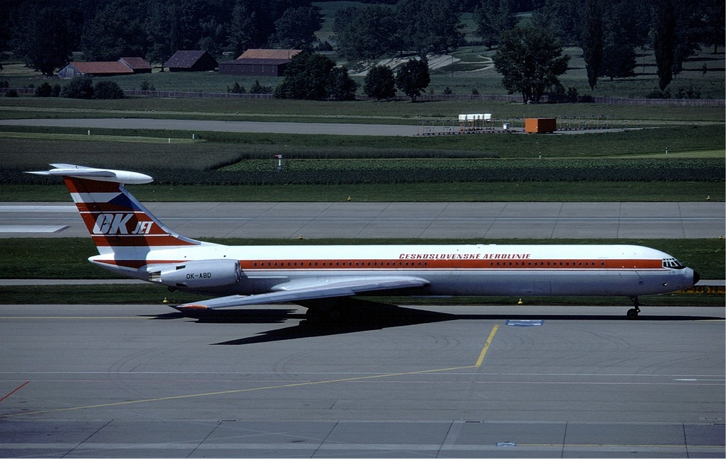 CSA Ilyushin Il-62